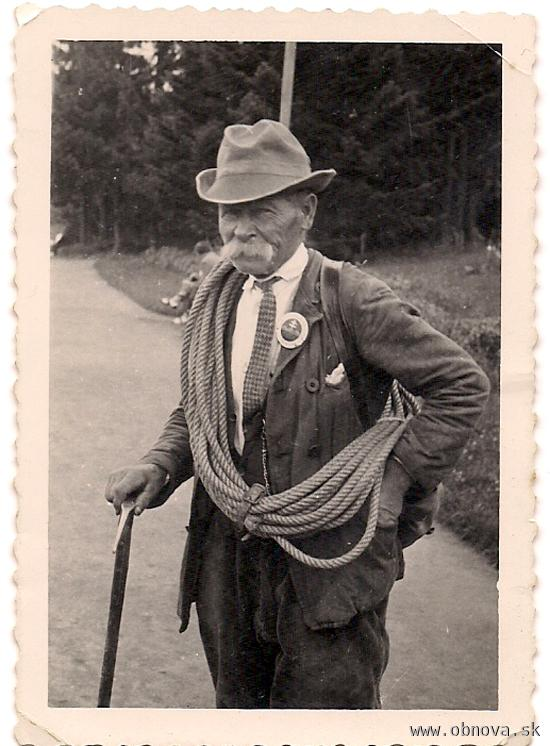 Horský vodca vo Vysokých Tatrách